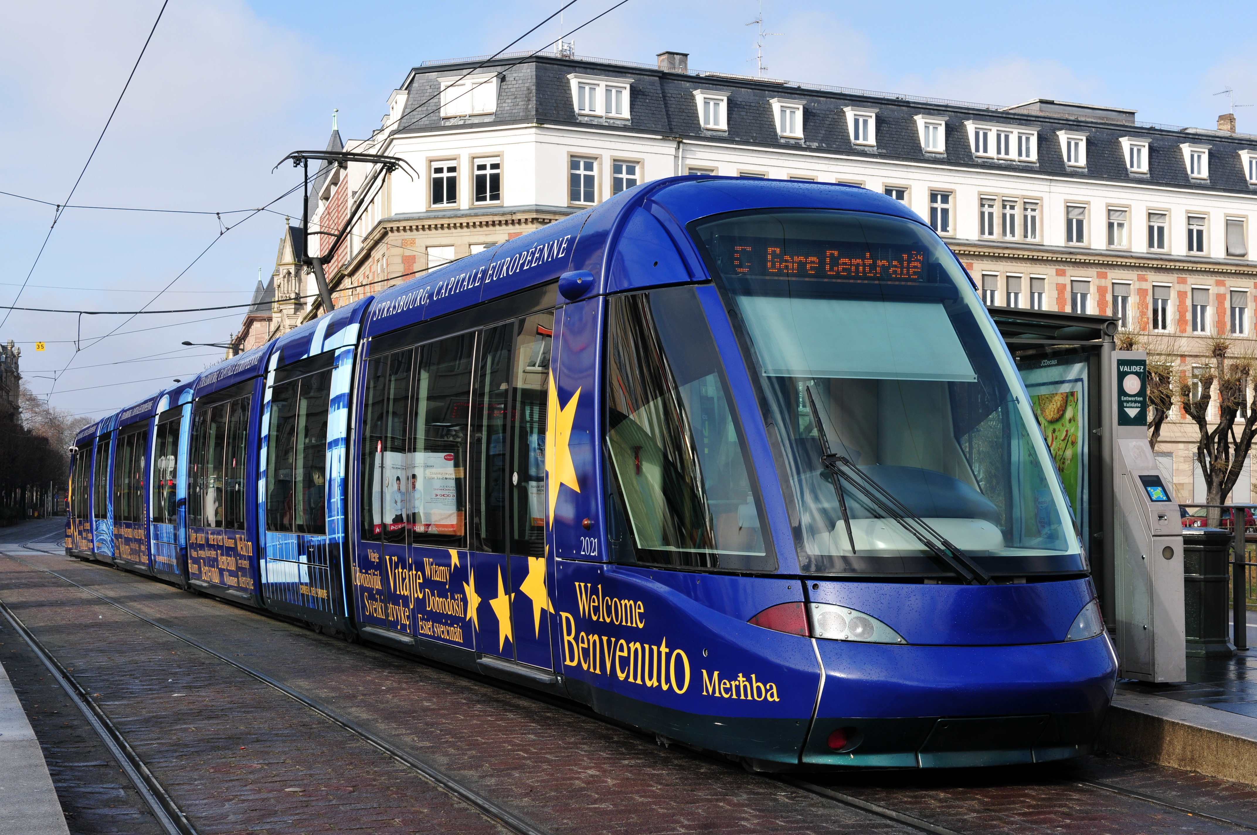 Straßburg European Parliament 2014 3.–7. February 2014, StrasbourgThis photo has been created within the project "WIKI loves parliaments / European Parliament". Usage and Help If you have any questions concerning this picture or how to use it, feel free to